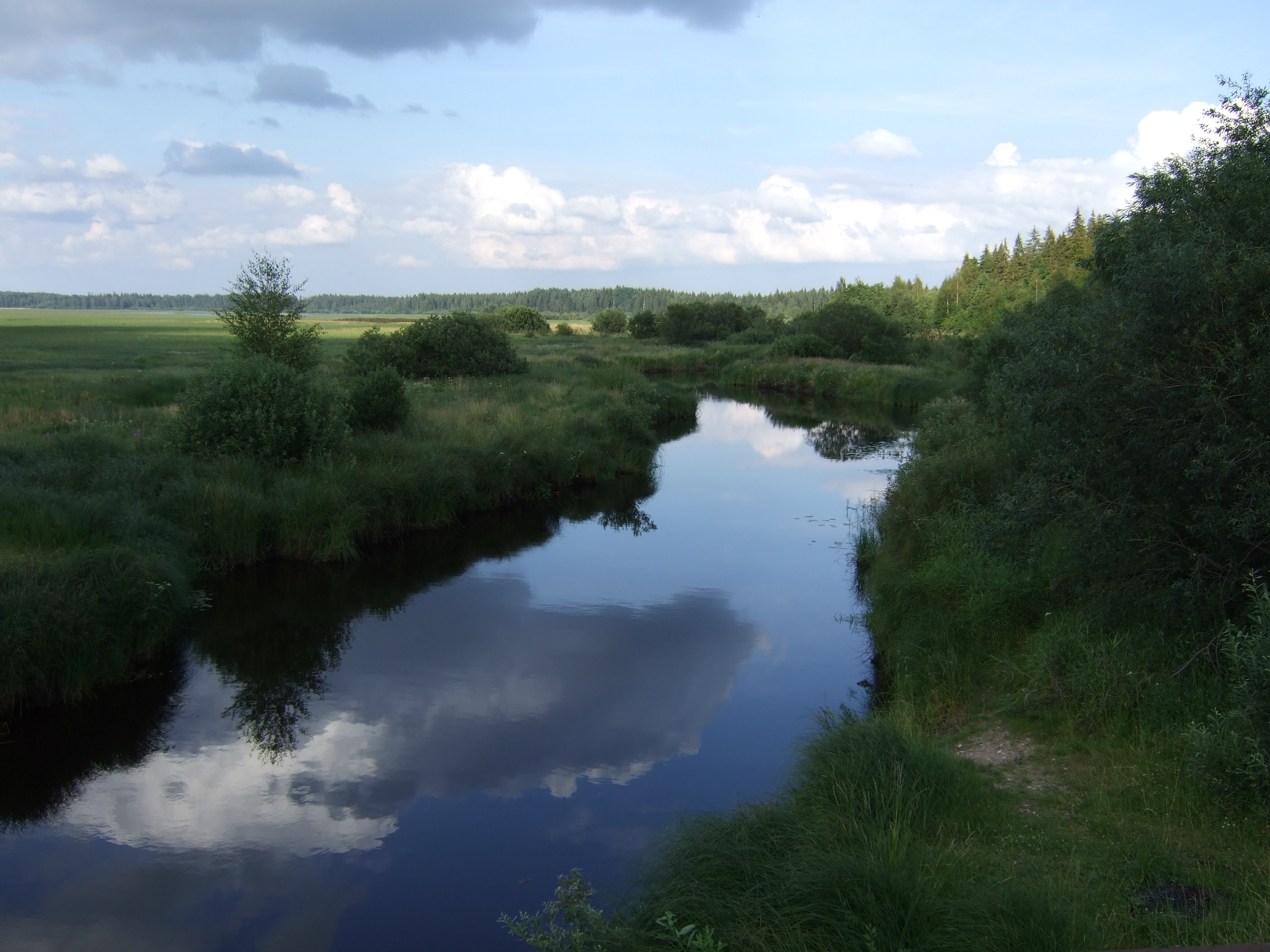 Вид на речку с моста